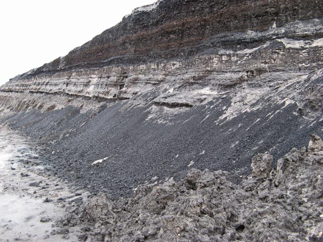 Kohlenschicht 6